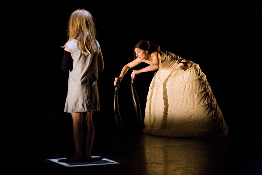 המיצג I would like to say sorry של A2Company